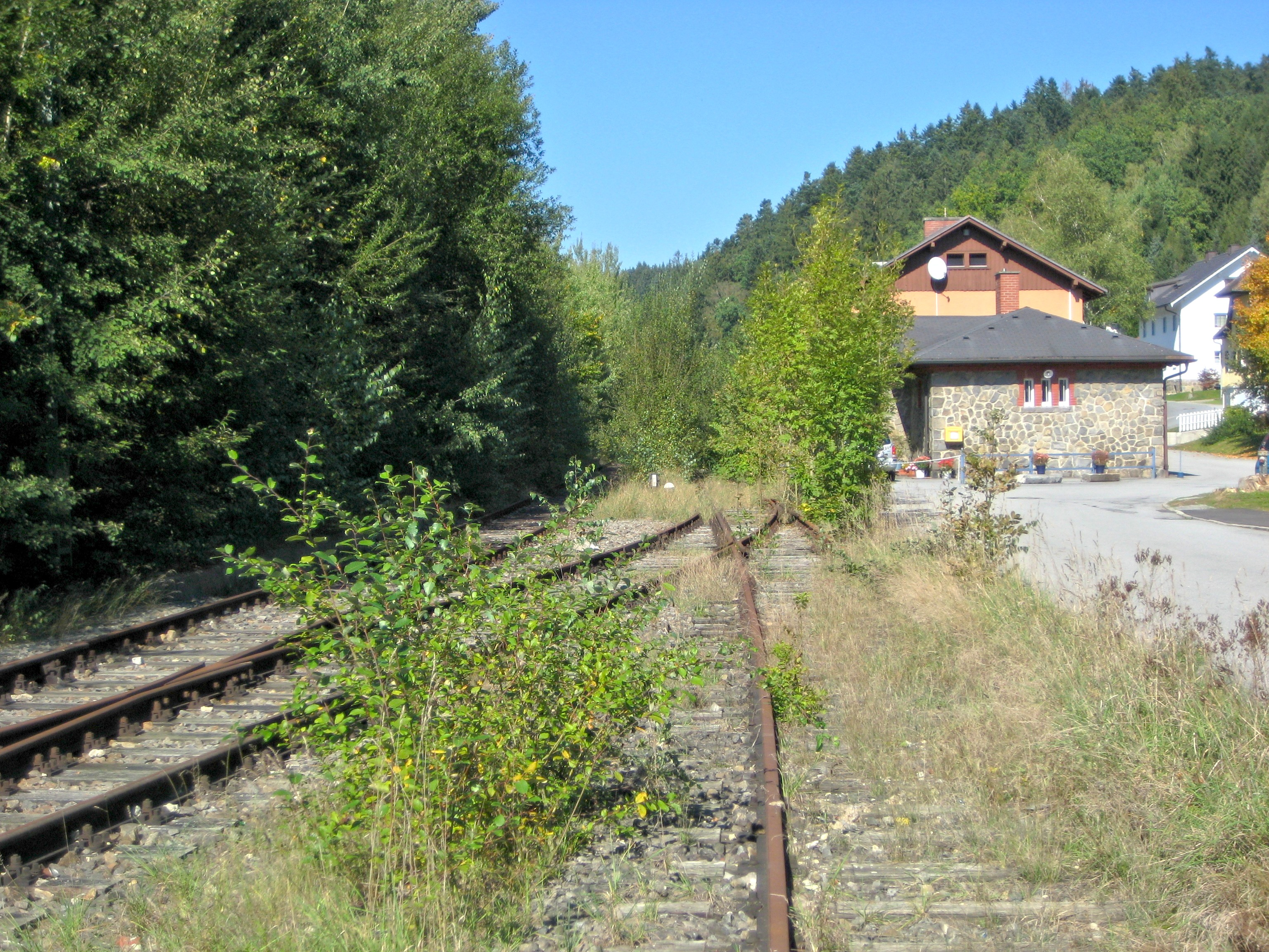 Ilztalbahn, ehemaliger Bahnhof in Kalteneck